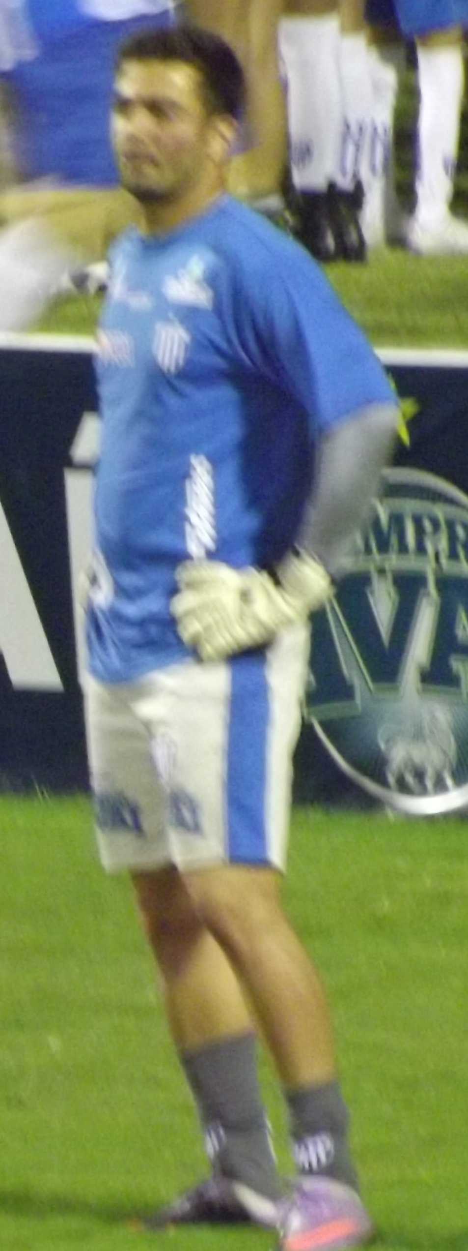 Diego pelo Avaí.